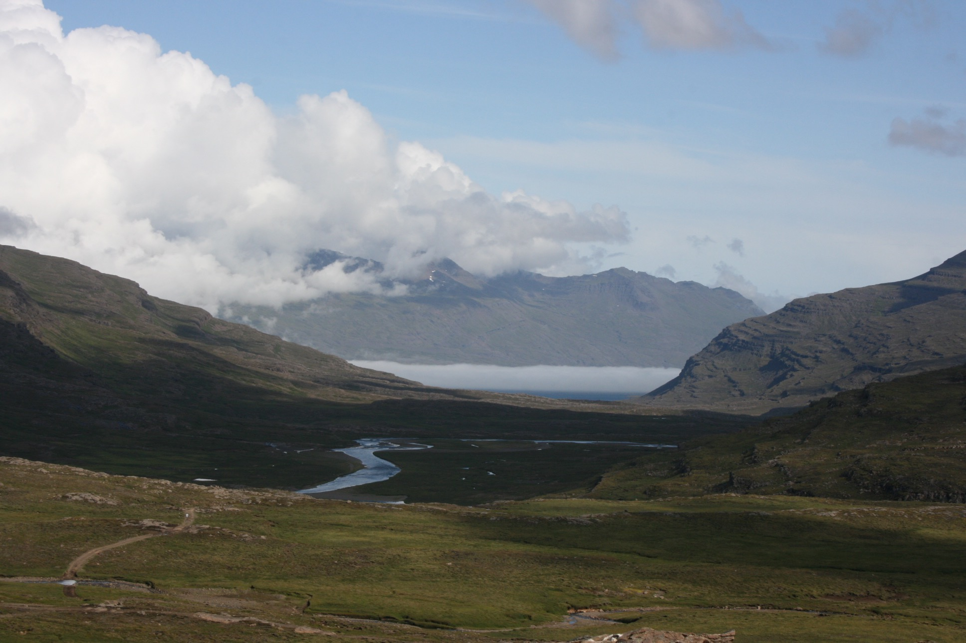 Fossárdalur